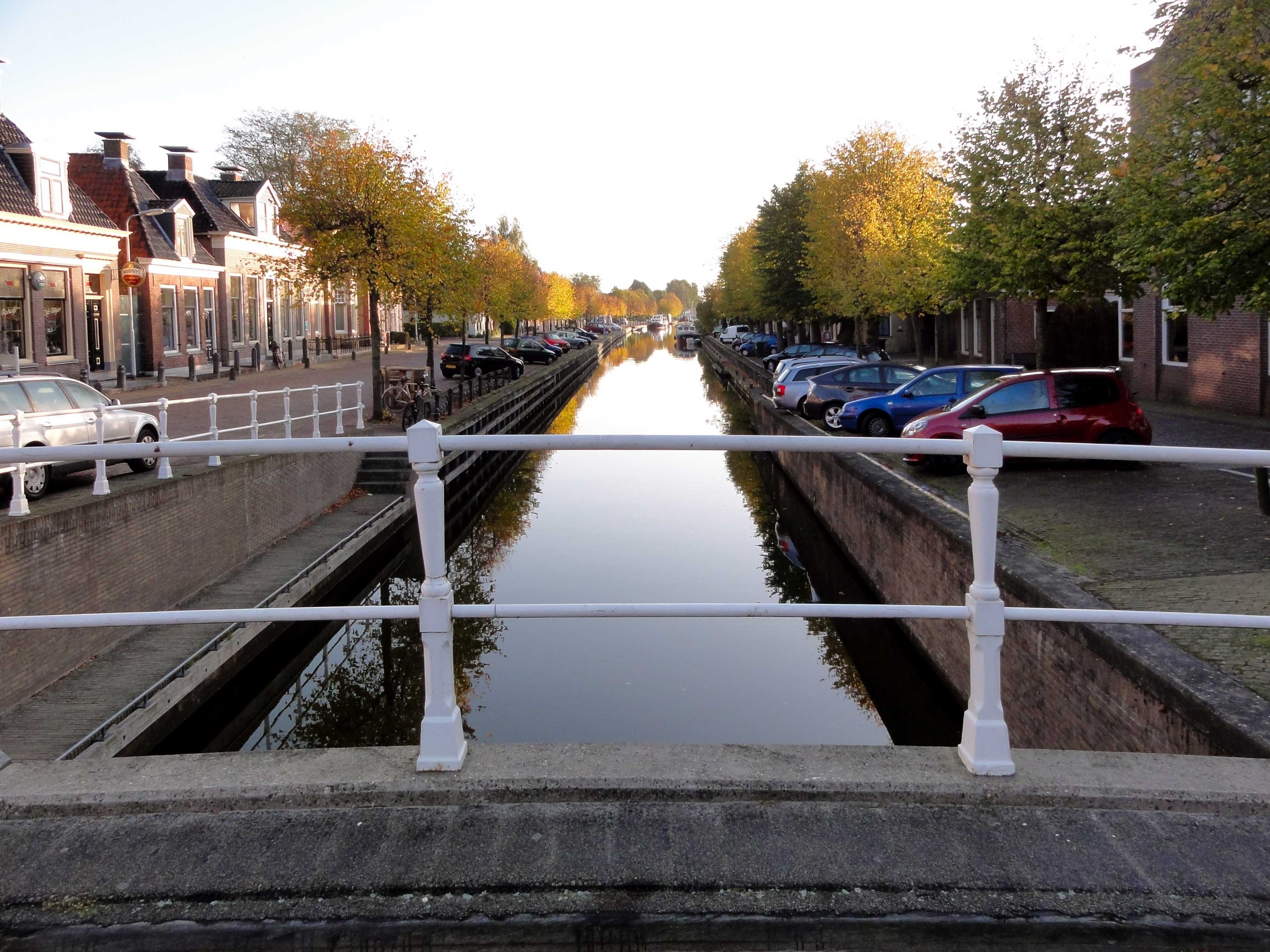 Balk met Meerweg en Lytse Side